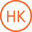 阪急宝塚本線・箕面線の路線記号。DejaVuフォントで作成